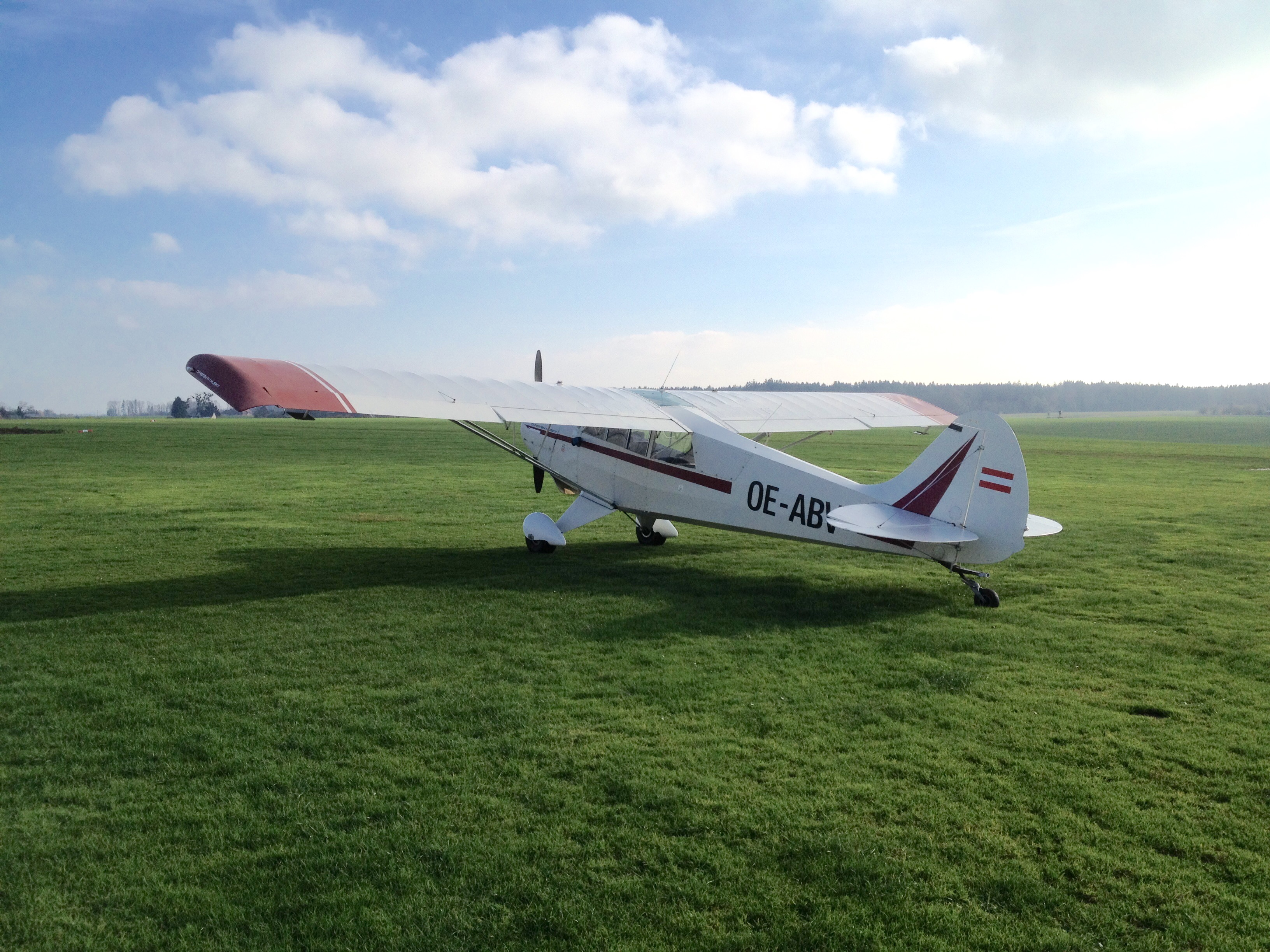 Aviat (Christen) Husky A-1